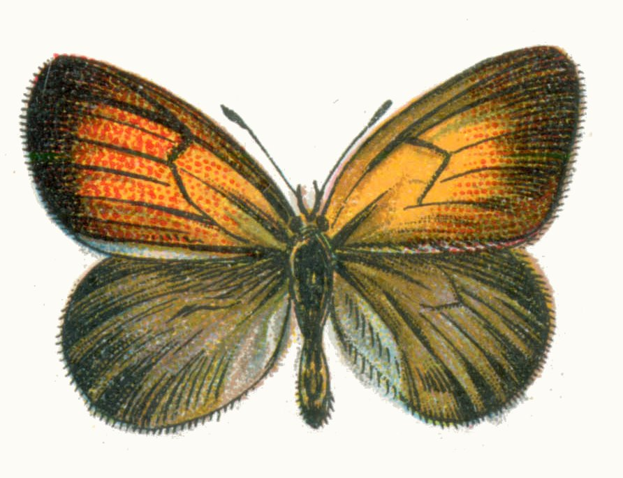 Coenonympha arcania